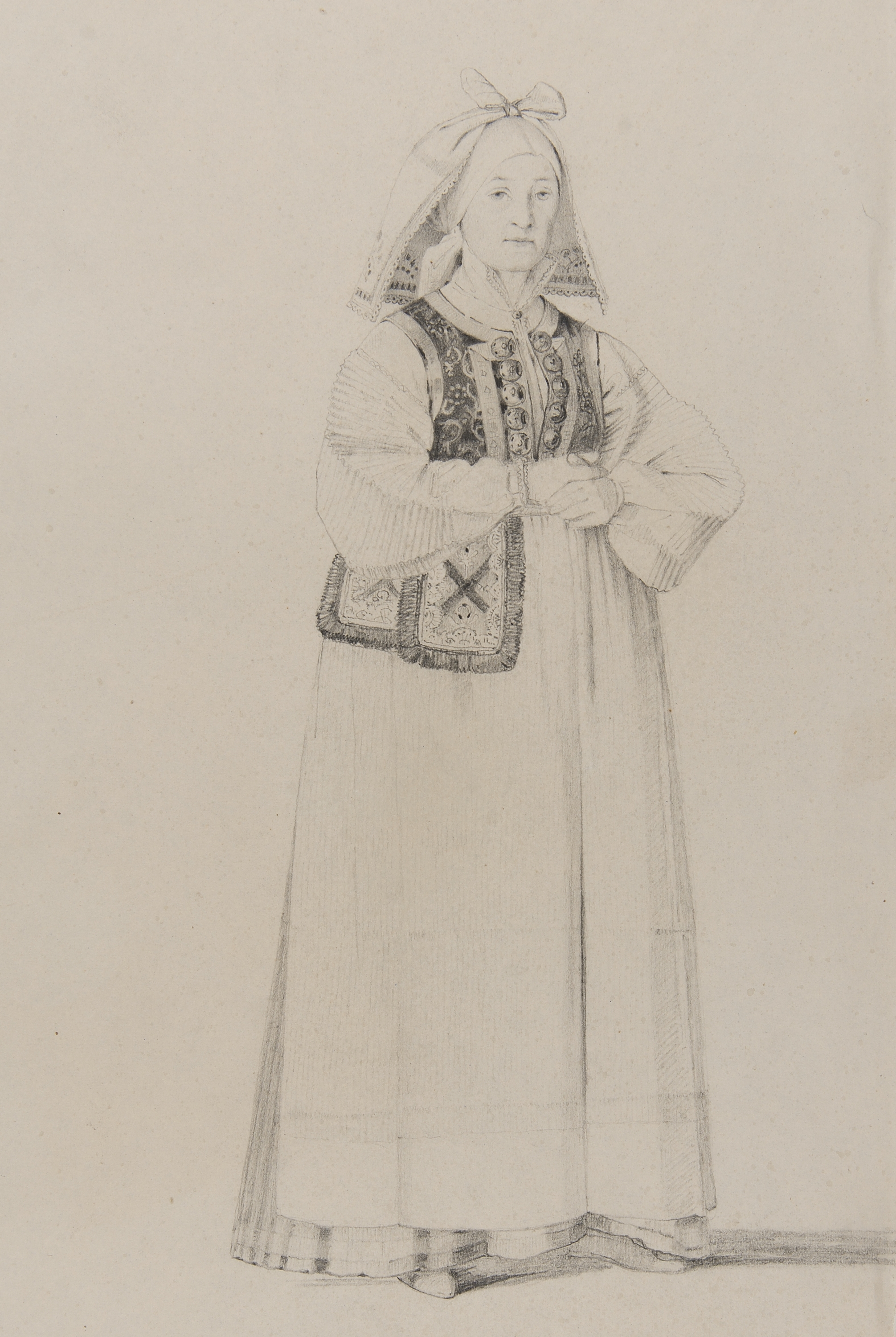 Dräkt. Akvarell i storformat av O. Wallgren Depicted place: Q3591663 (Q3591663) (Härad), Sweden (Q34) (Land), Scania (Q180756) (Landskap)